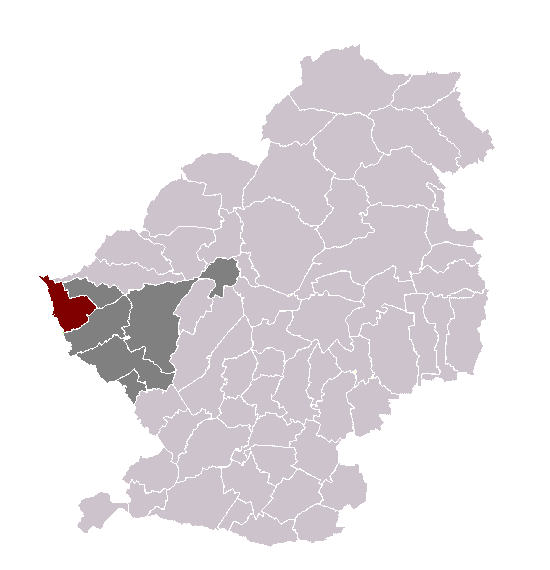 Esquerchin dans son canton et son arrondissement